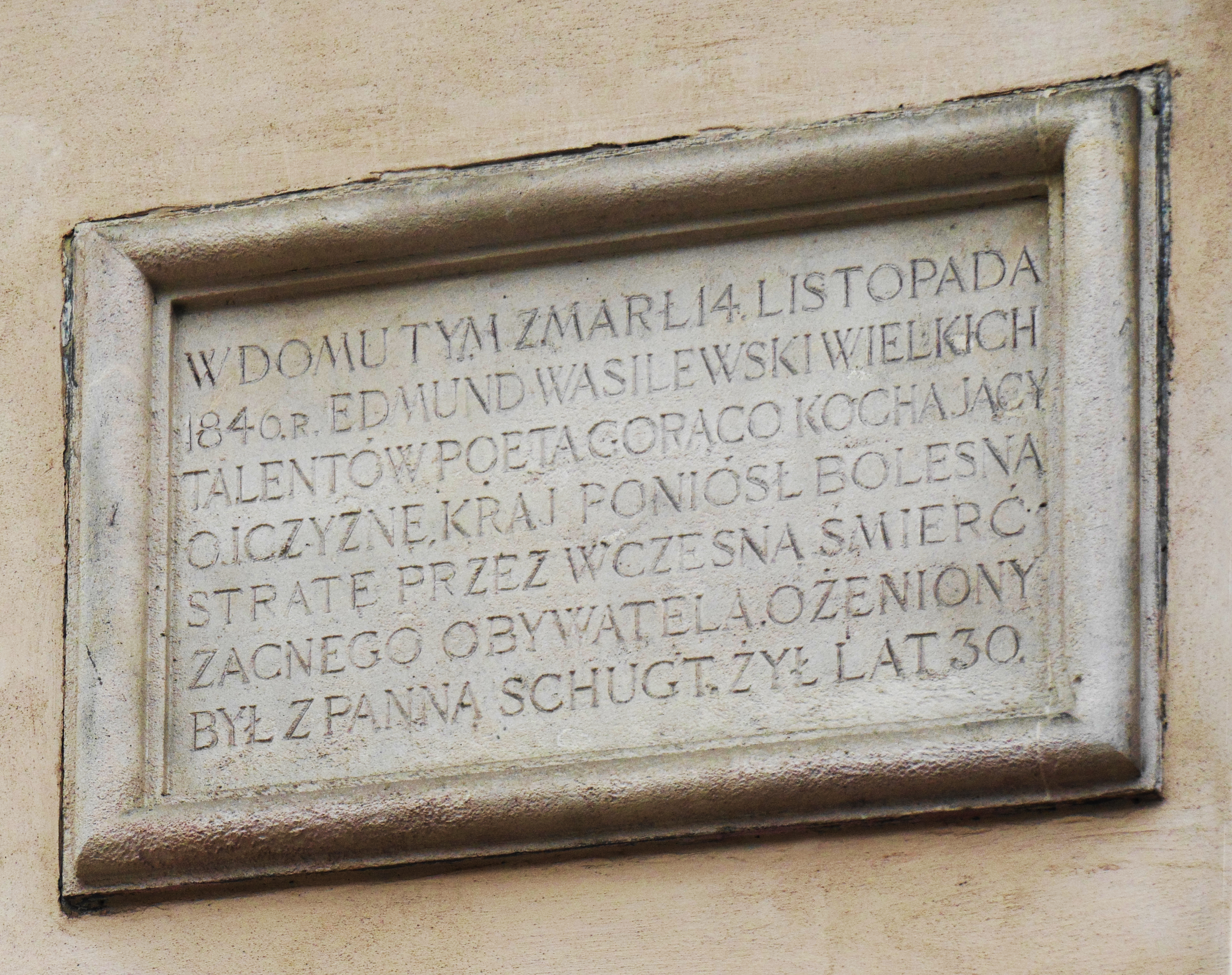 Tablica pamiątkowa Edmunda Wasilewskiego, ul. Dominikańska, Kraków.